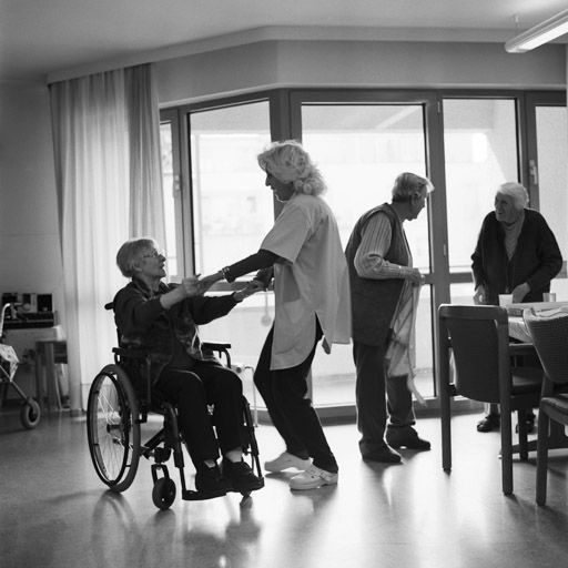 Altenheim